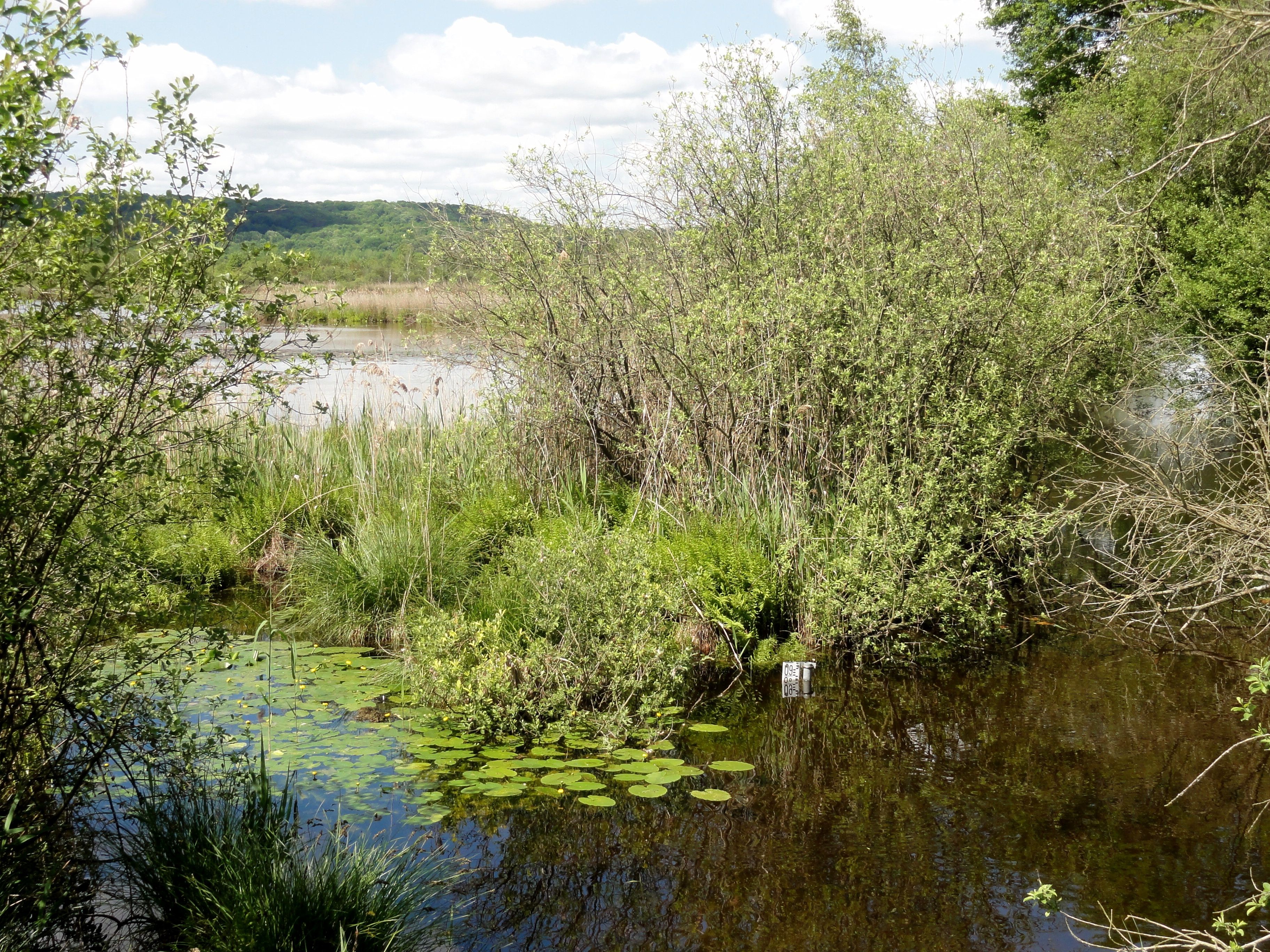 Marais de Cinqueux, vu depuis le pont de la RD sur la Petite Rivière, à la limite avec Sacy-le-Grand.